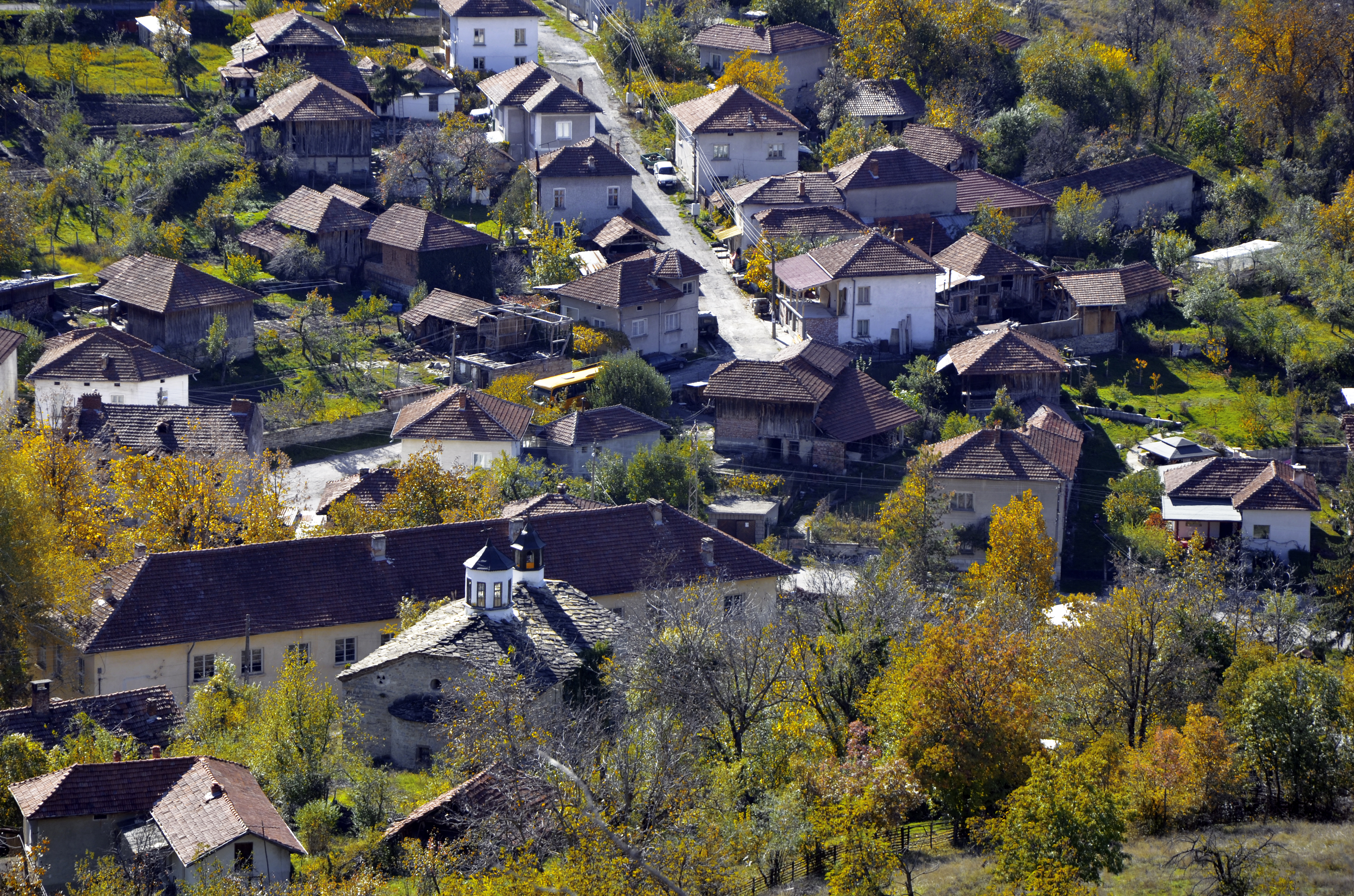 с. Малък Извор